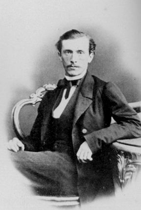 Eestimaa rüütelkonna peamees Wilhelm von Wrangell (1831-1894)